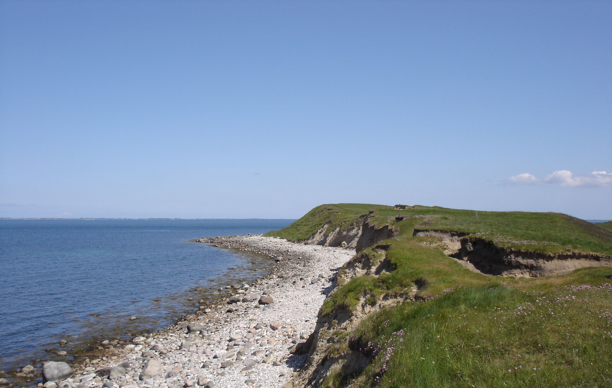 Ordrup Næs